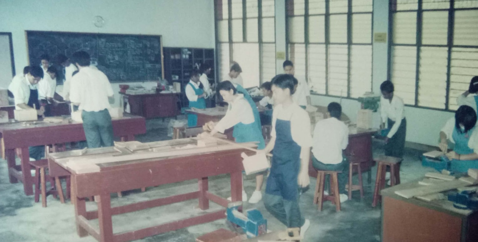 Bengkel Kemahiran Hidup tahun 90an